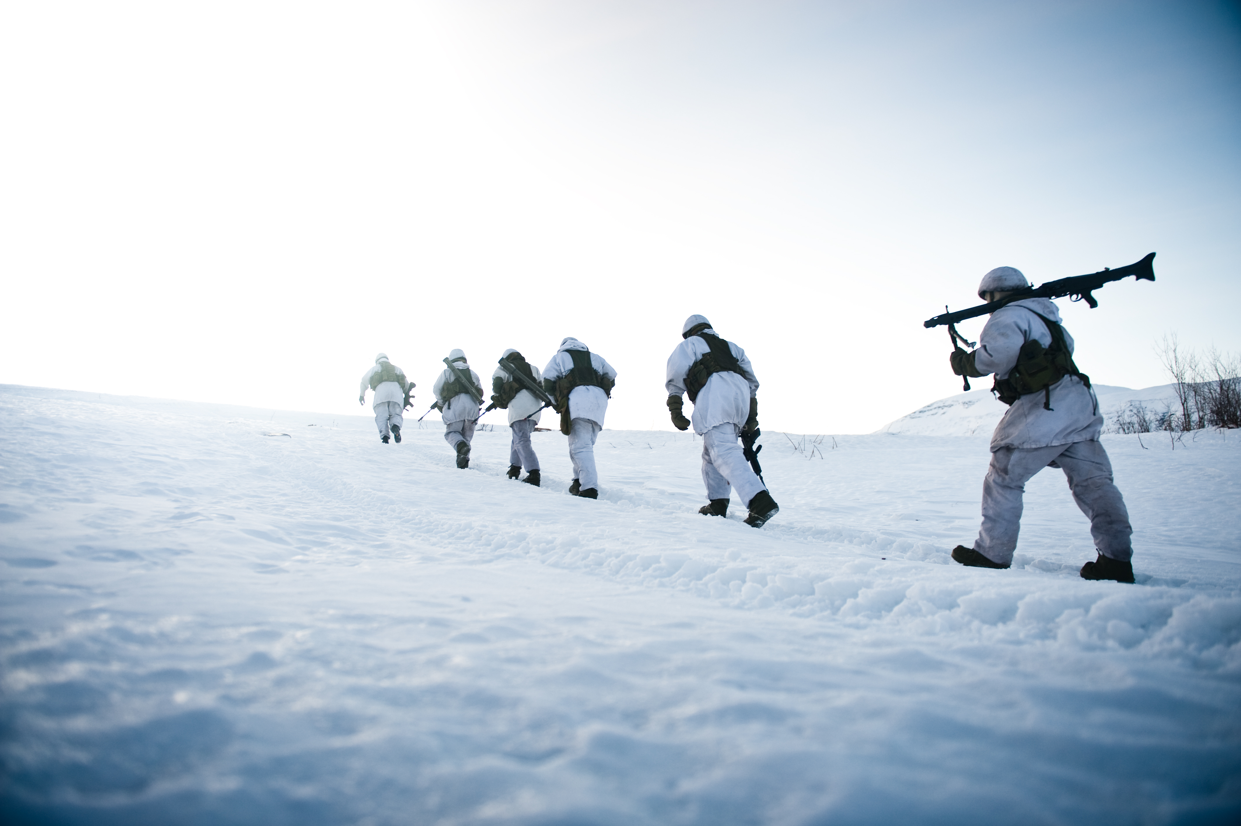 Stormesk 3, øvelse Ulv (13 of 33)